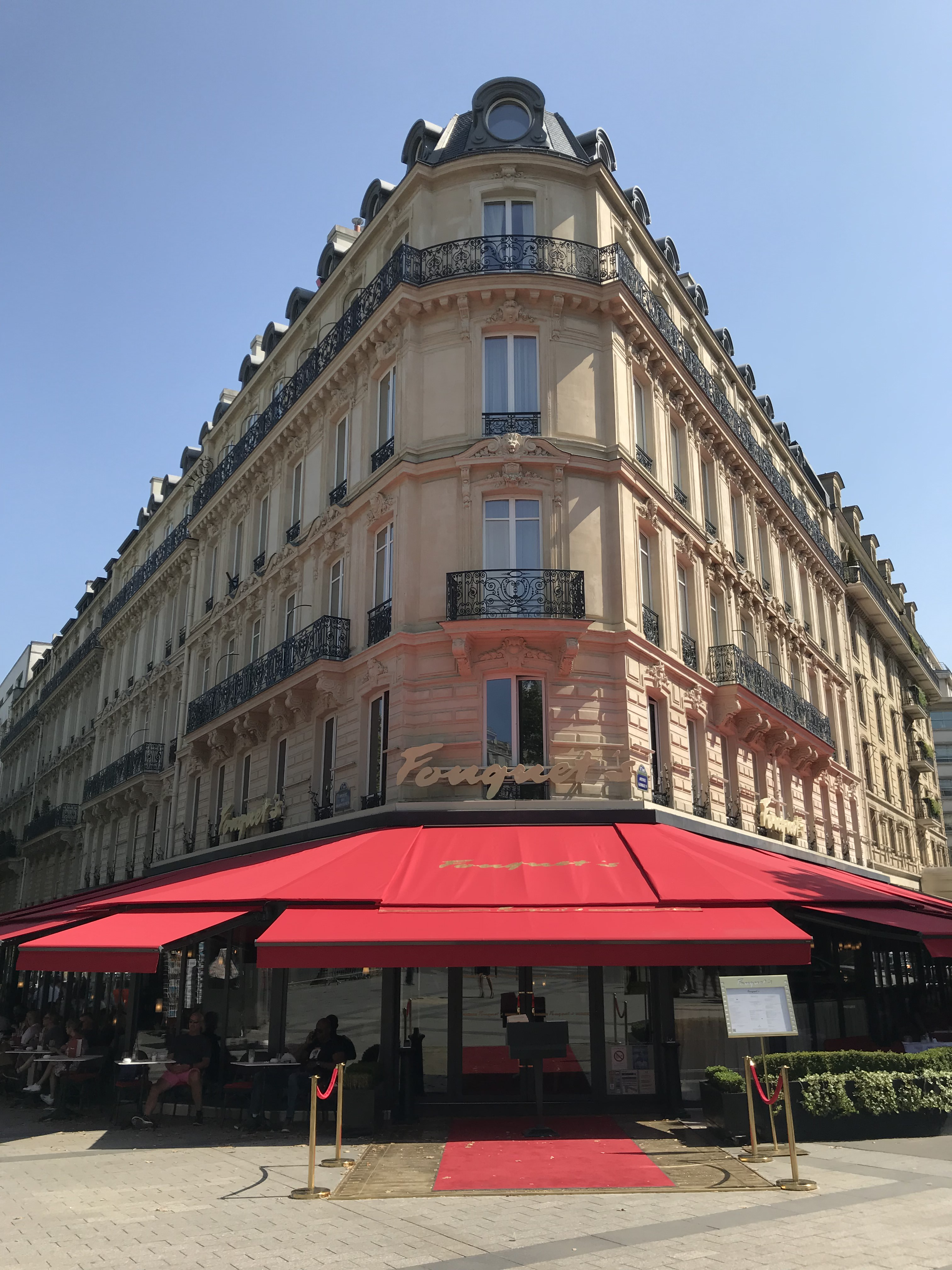 Fouquet's Paris - brasserie et hotel de luxe sur les Champs-Élysées